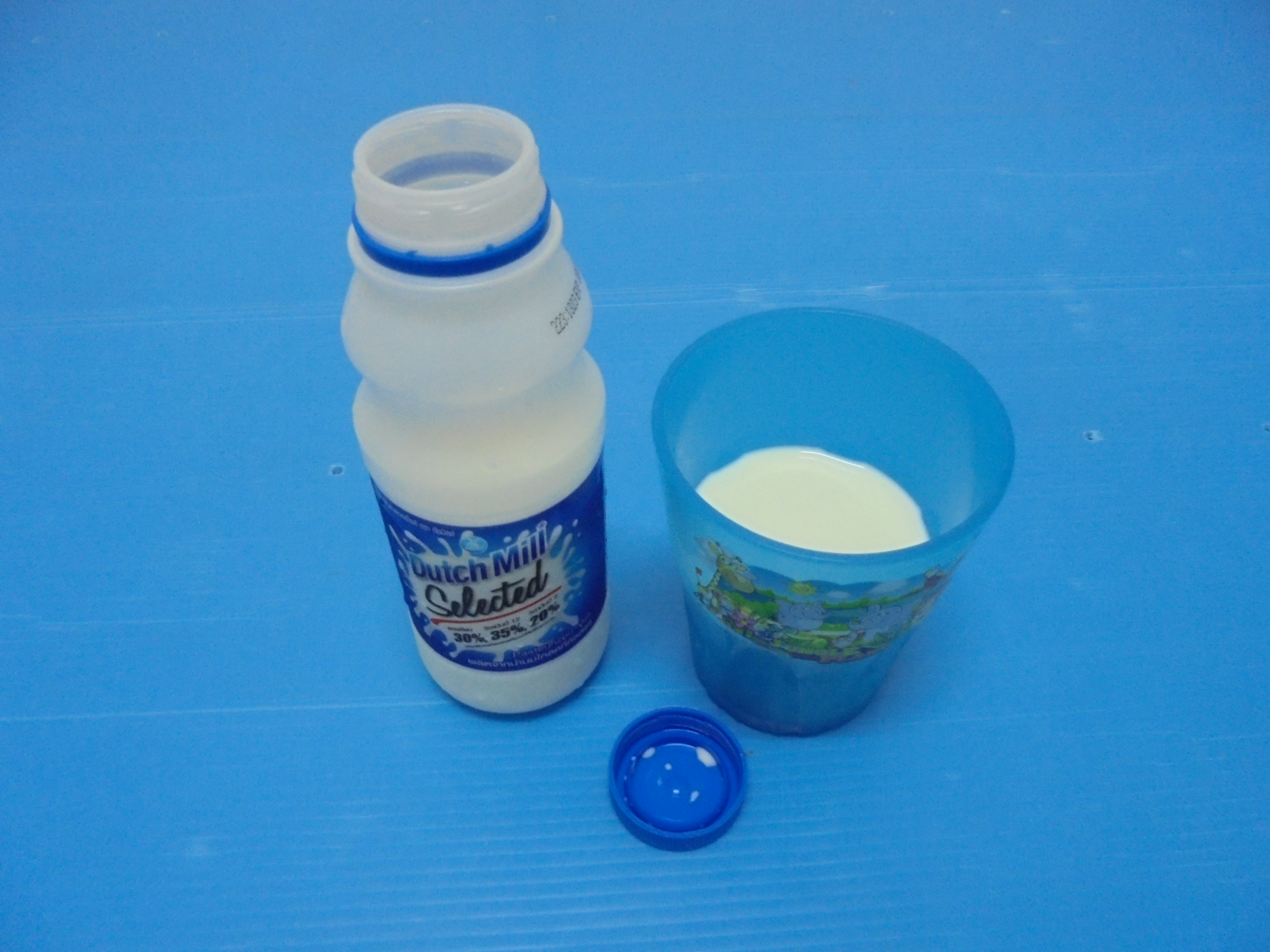 မြန်မာဘာသာ: နို့